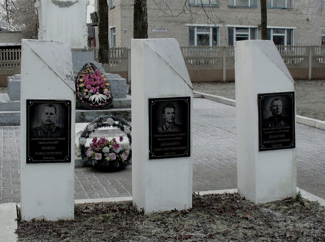 Город Городок. Витебская область Белоруссии. Мемориальный комплекс на военном кладбище. Могилы Героев Советского Союза Зюбина П. П., Дыдышко А. И., Толкачёва В. А.